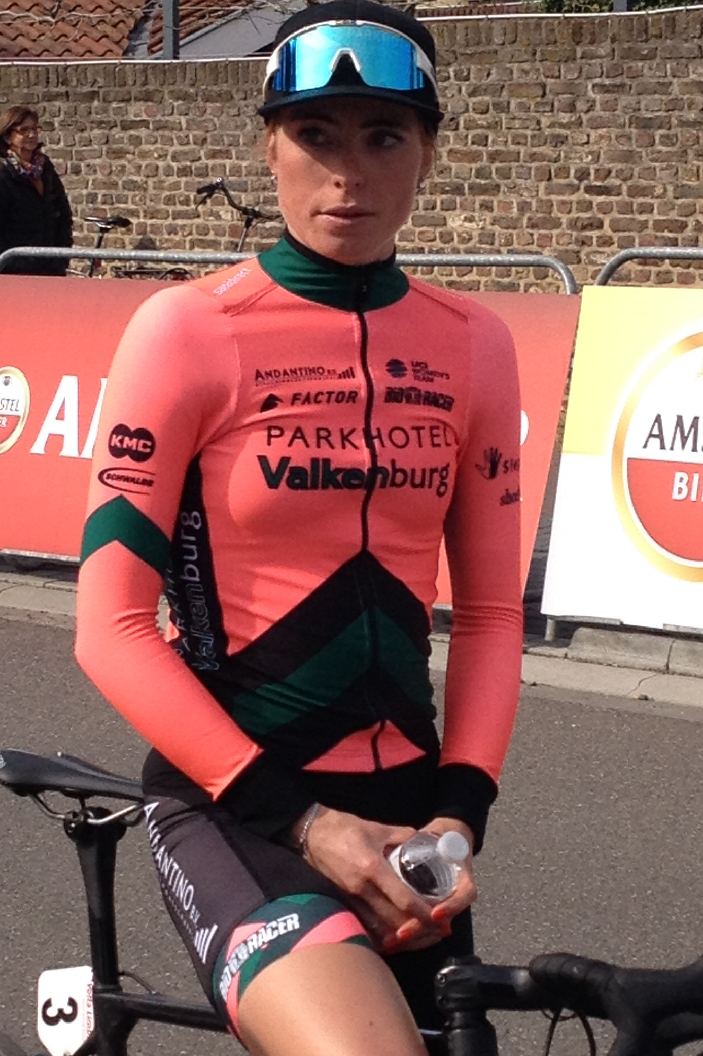 Volta Limburg Classic 2019 voor vrouwen met start en finish in Eijsden, Limburg, Nederland